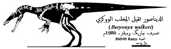 رسمٌ مُرممٌ للديناصور ثقيل المخلب الووكري، أو الباريونيكس الووكري (Baryonyx walkeri)، استنادًا إلى بقايا العينة الأصليَّة المُكتشفة منه.